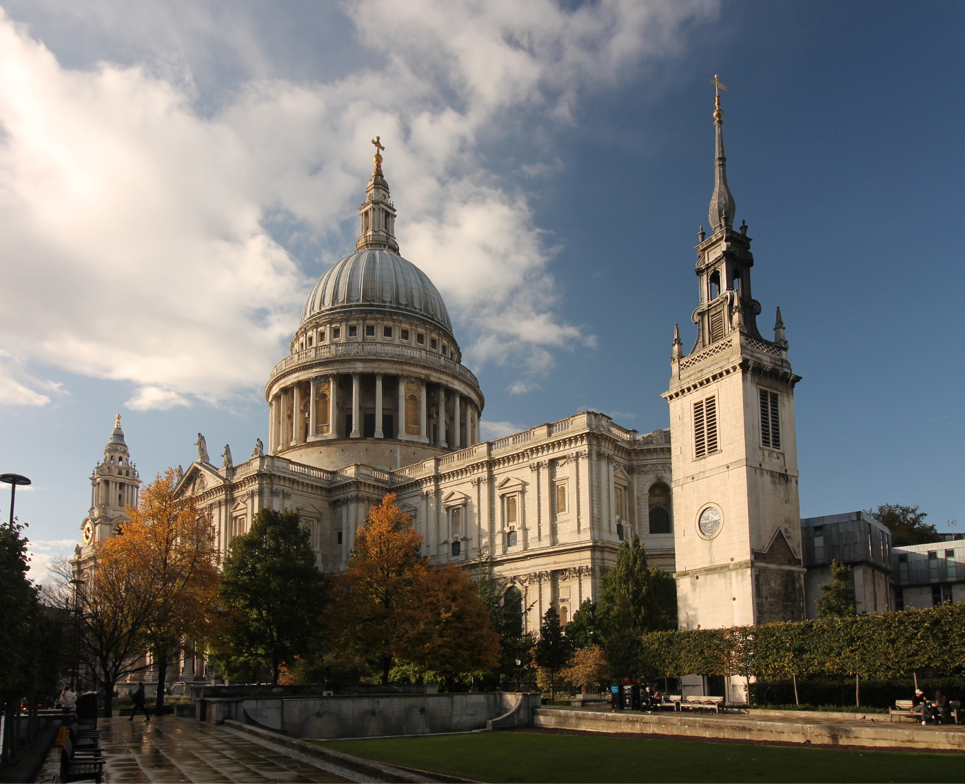 A londoni Szent Pál-székesegyház délkeleti irányból, 2016. október 16-án. Mellette az egykori Szent Ágoston templom megmaradt tornya